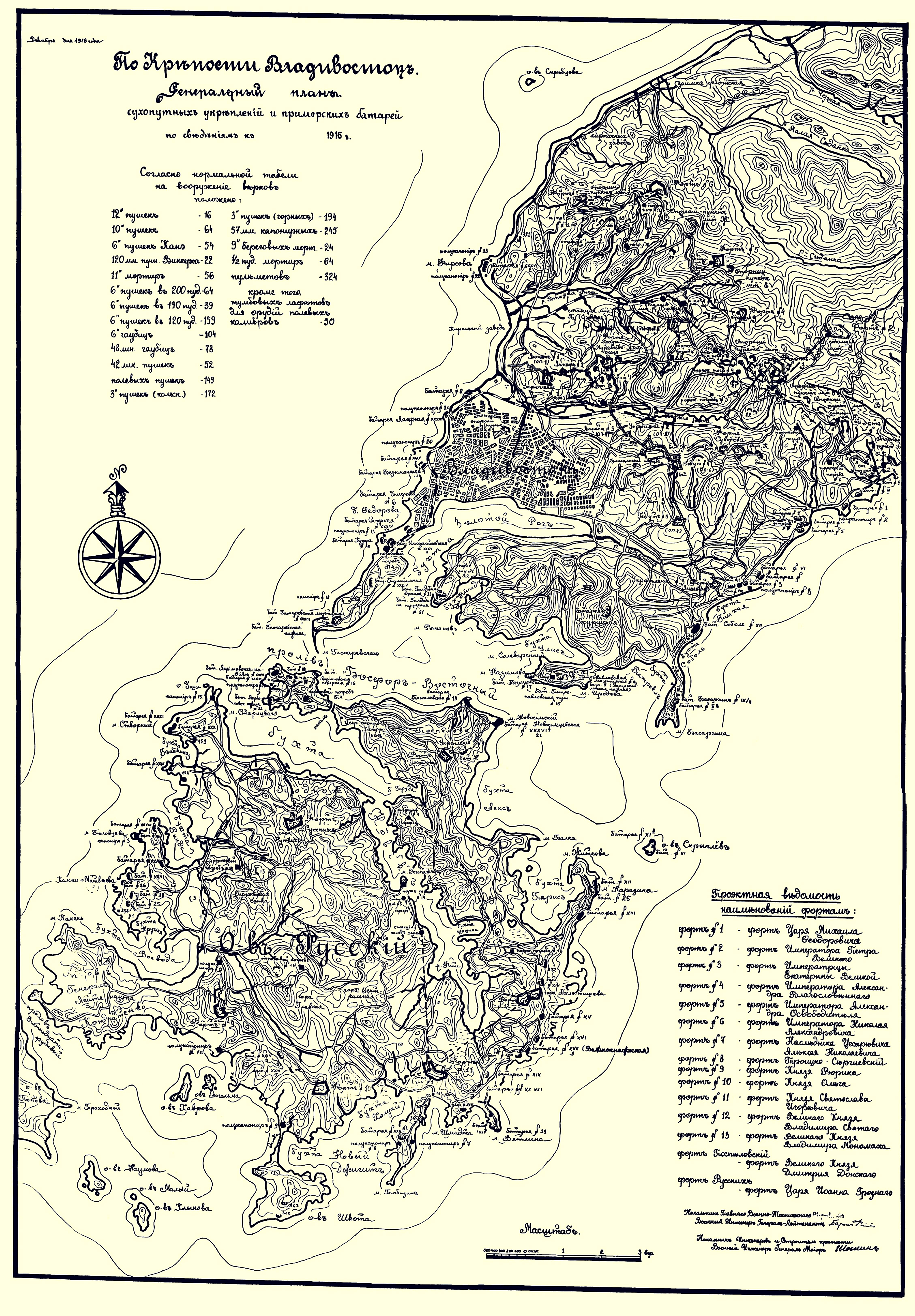 Генеральный план Владивостокской крепости с указанием сухопутных укреплений и приморский батарей по состоянию на 1916 год